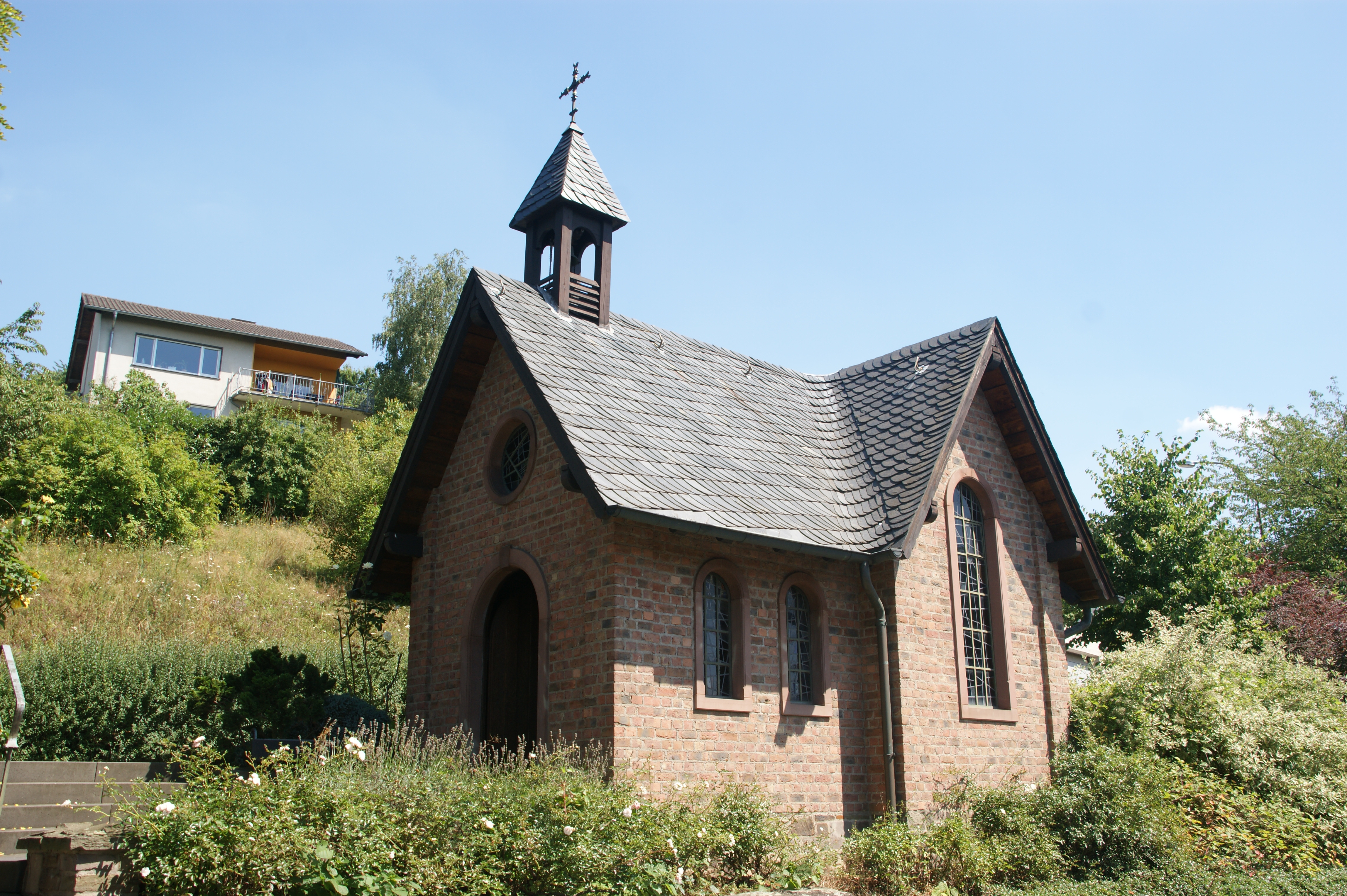 Kapelle in Ockenfels "In der Mark" (erbaut 1985, Kriegsdenkmal)